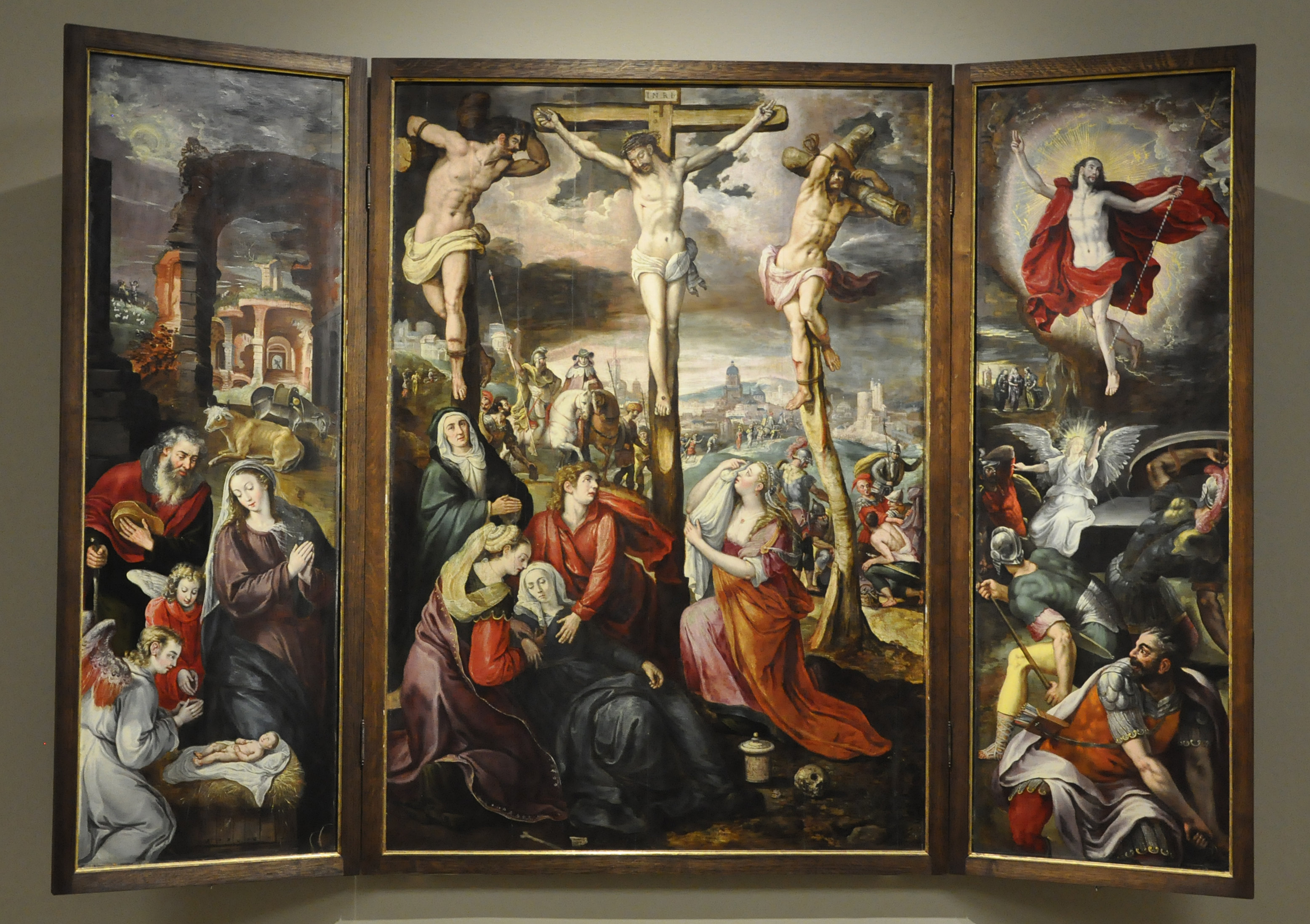 Drieluik met krusiging, geboorte en verrijzenis van Christus